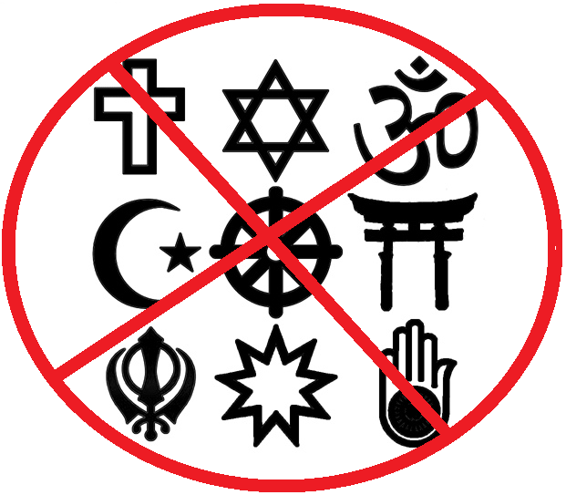 Din karşıtı kullanımlar amacıyla hazırlandı